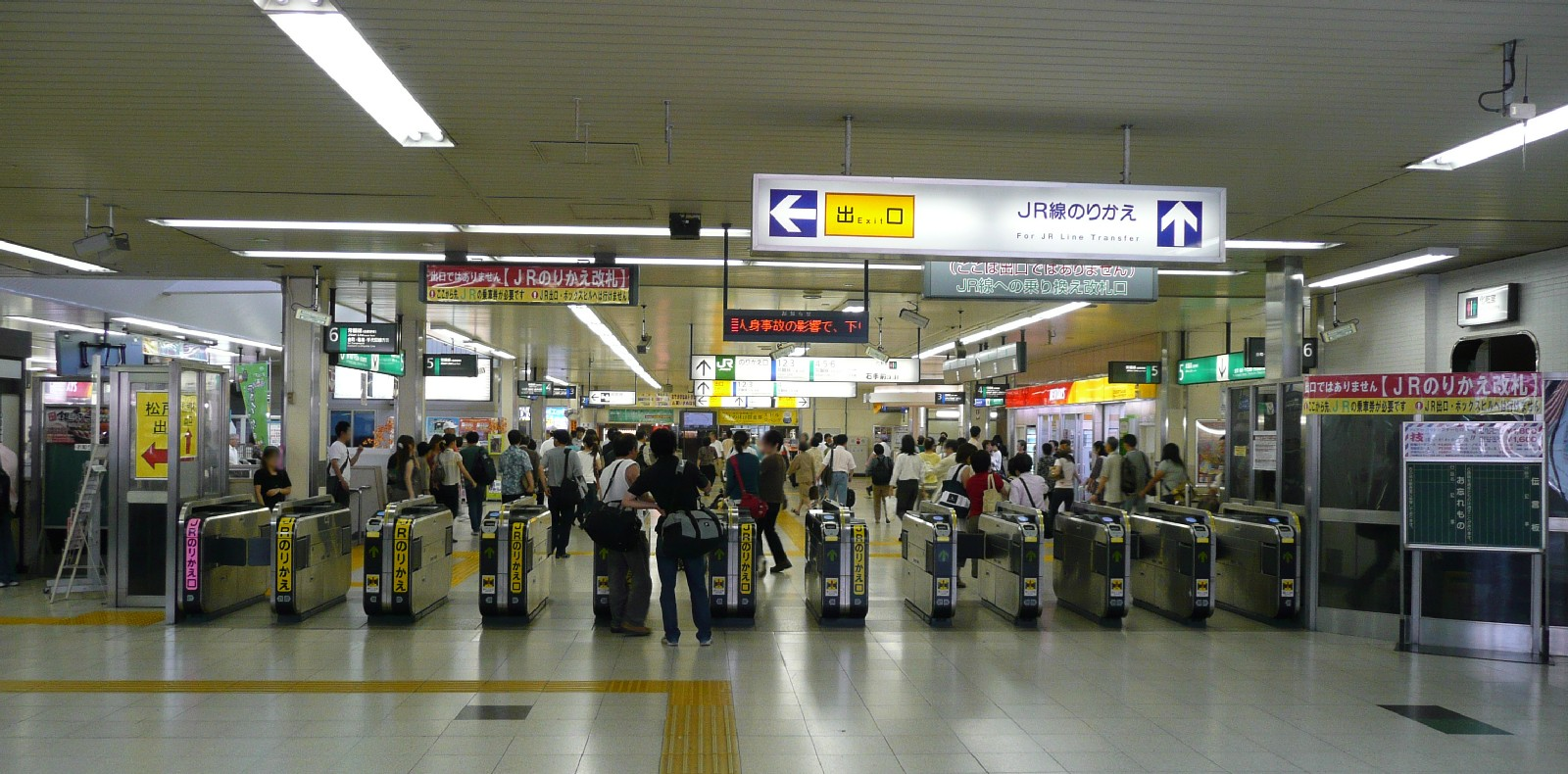 松戸駅JR・新京成乗換改札口（新京成側から撮影）